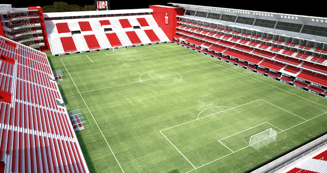 Render Nuevo Estadio Estudiantes de La plata